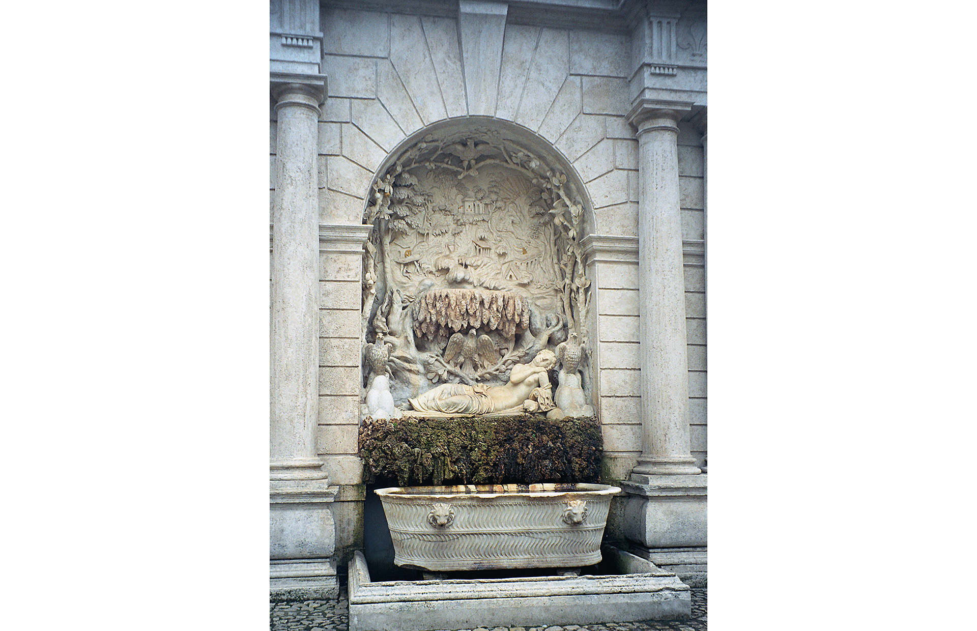 Villa d'Este, Tivoli. Venere dormiente dal giardino segreto. Il paesaggio retrostante rappresenta l'ambiente da cui sgorgava la fonte dell'acqua Rivellese, da cui proveniva l'acqua potabile per la villa e la città.